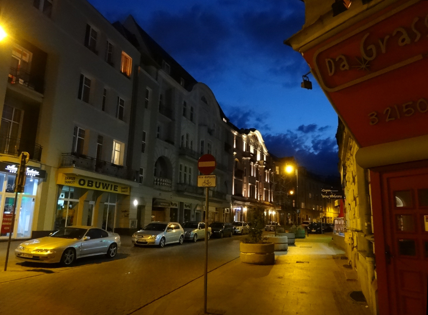 Ulica Dworcowa w Bydgoszczy